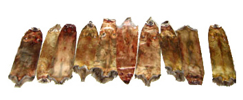 Десять шкурок белки = 1 тиккури